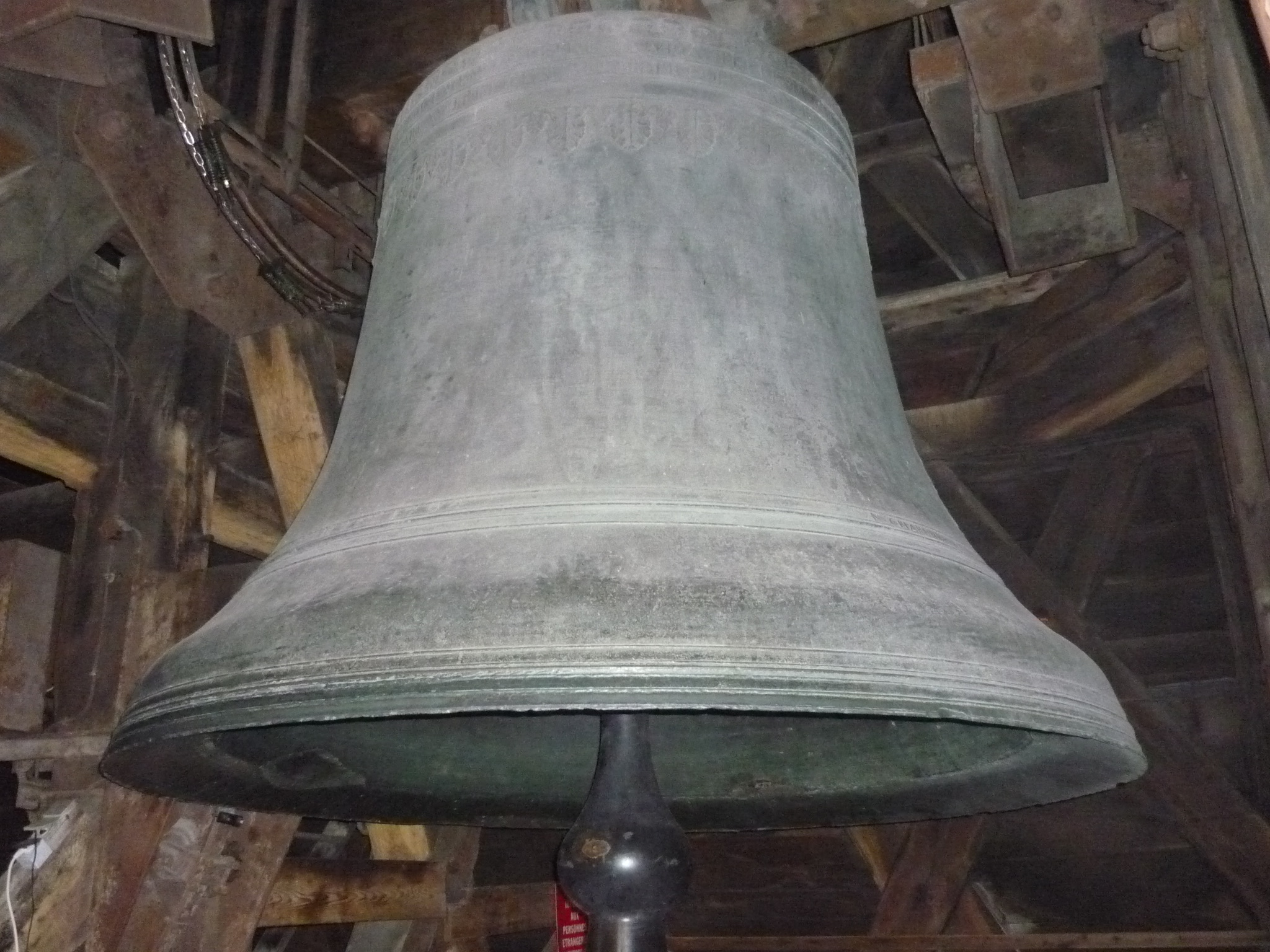 Die Glocke Emmanuel in Notre Dame de Paris, Frankreich.